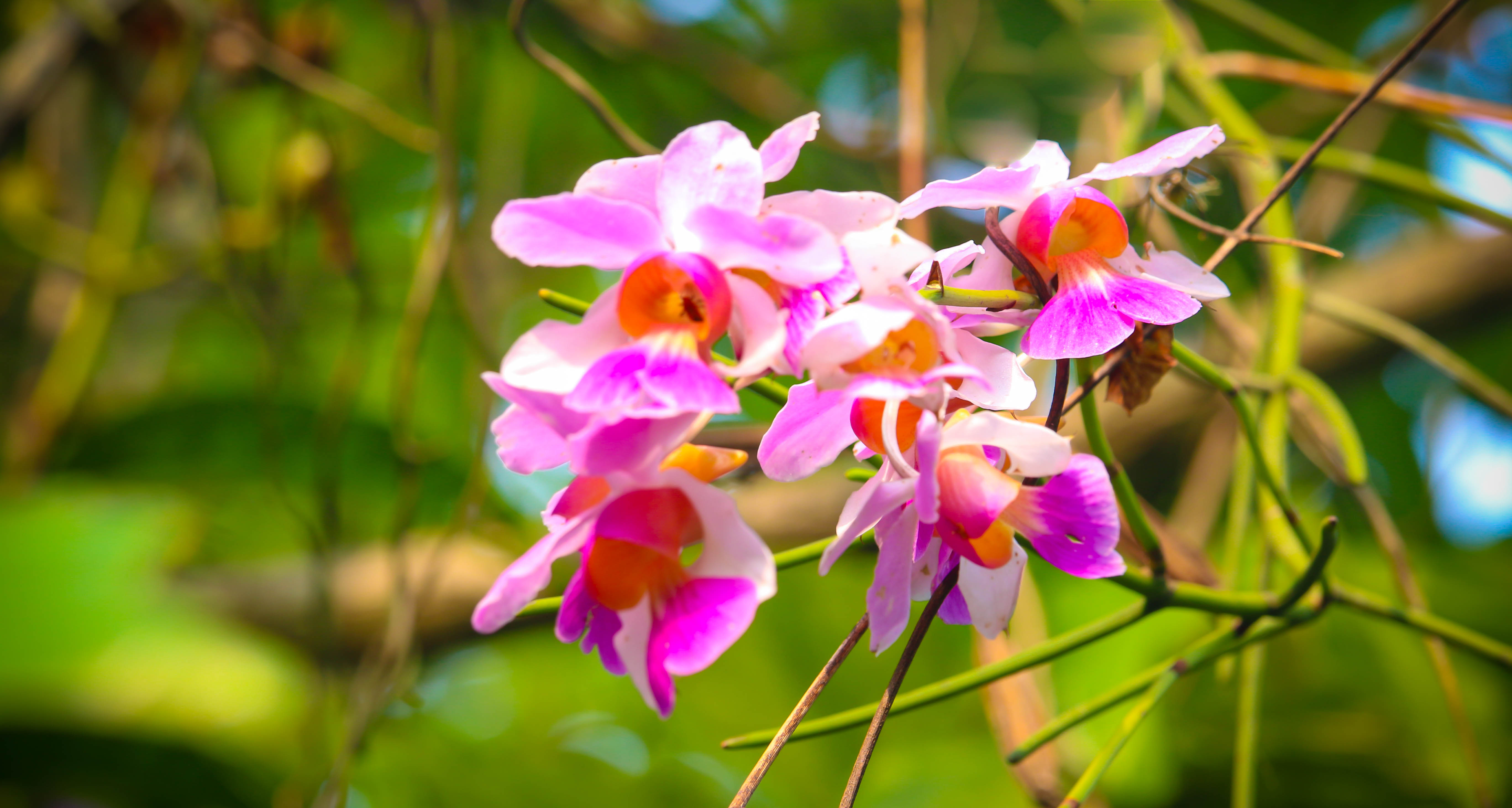 মধুপুর জাতীয় উদ্যান